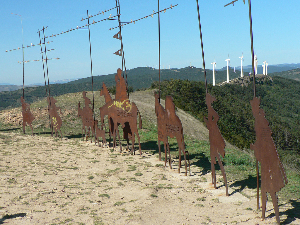 Monumento al Peregrino at Alto del Perdon